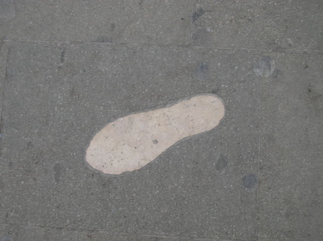 Orma sul ponte dei pugni a Venezia, sul quale si svolgevano dei veri e propri scontri di lotta libera fra due squadre.